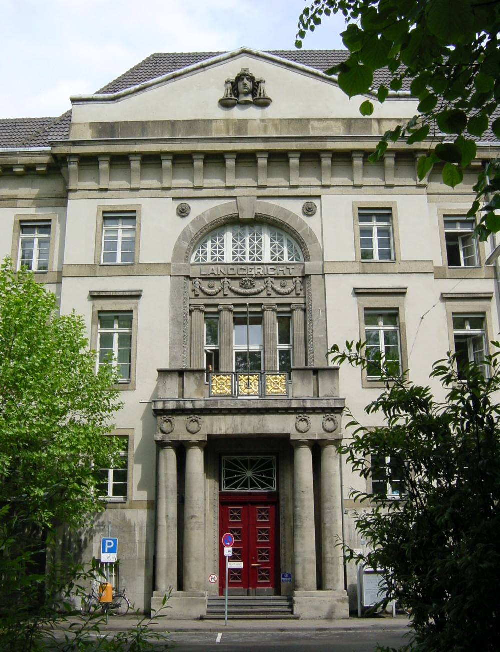 Description: Landgericht, Nordwall, Krefeld Date: 22.5.2006 Author: DER UNFASSBARE